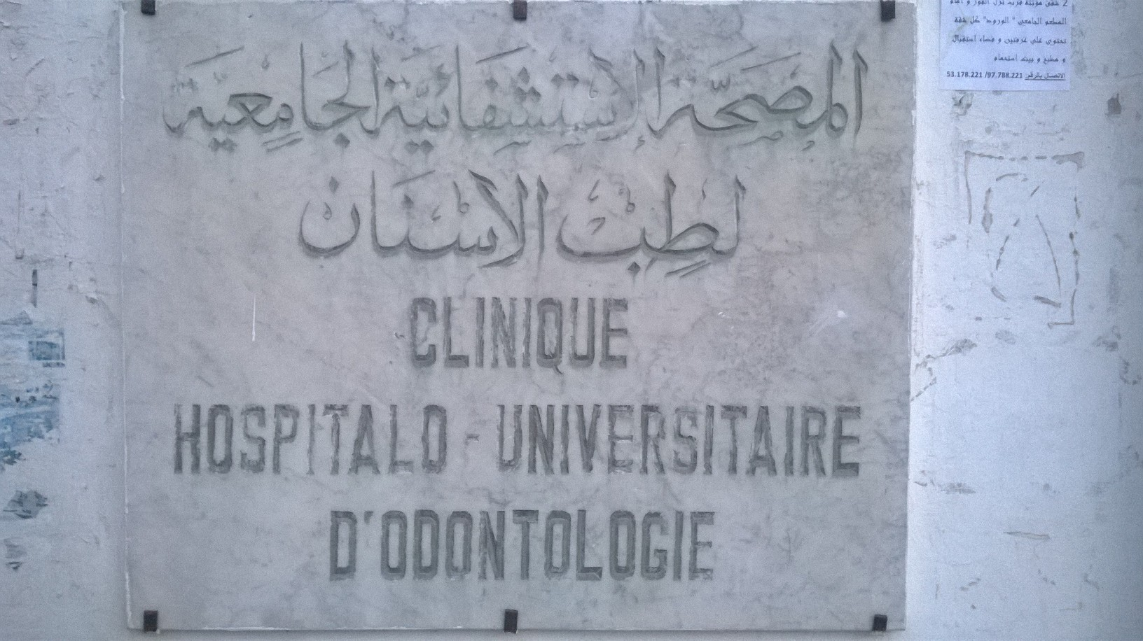 Clinique de médecine dentaire de Monastir, Monastir, Tunisie المصحة الاستشفائية الجامعية لطب الأسنان بالمنستير, المنستير، تونس